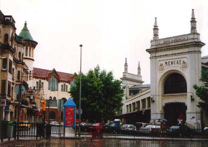 Mercat Central de Sabadell Foto feta al juny del 1992